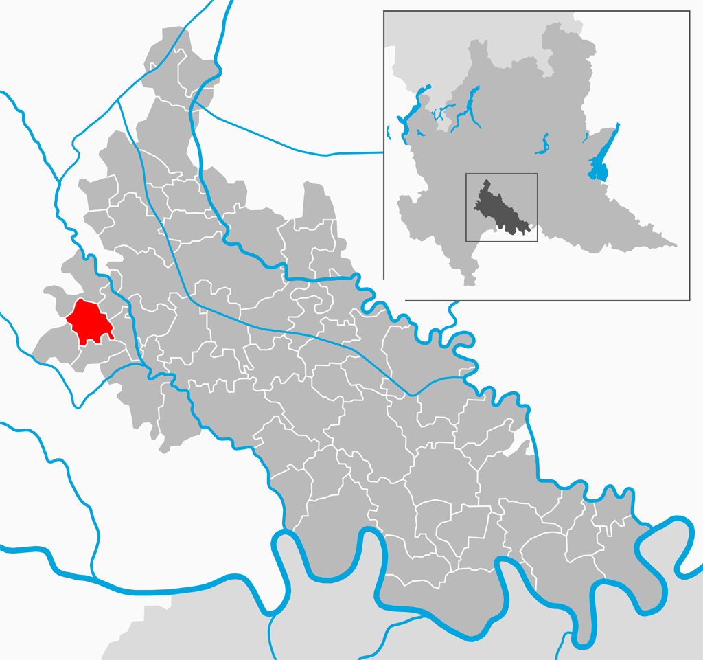 Il comune di Caselle Lurani nella provincia di Lodi